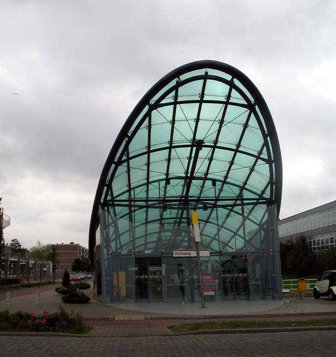 Metrostation Schiedam Parkweg, 22 oktober 2005